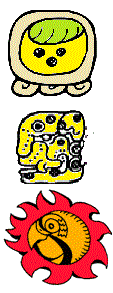 Glifo maya traslitterato Ixbalamke